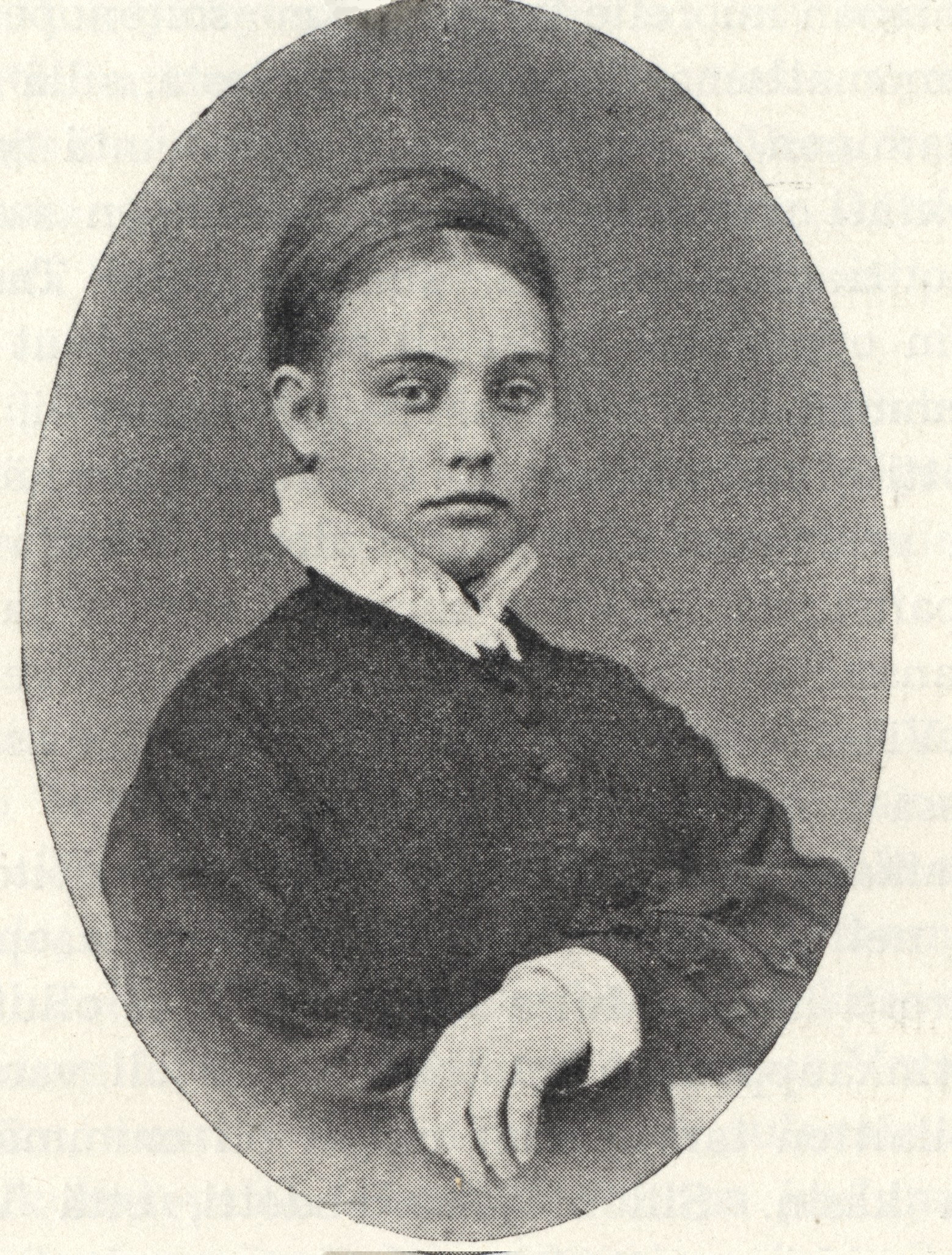 Vera Hjelt 16 vuotiaana